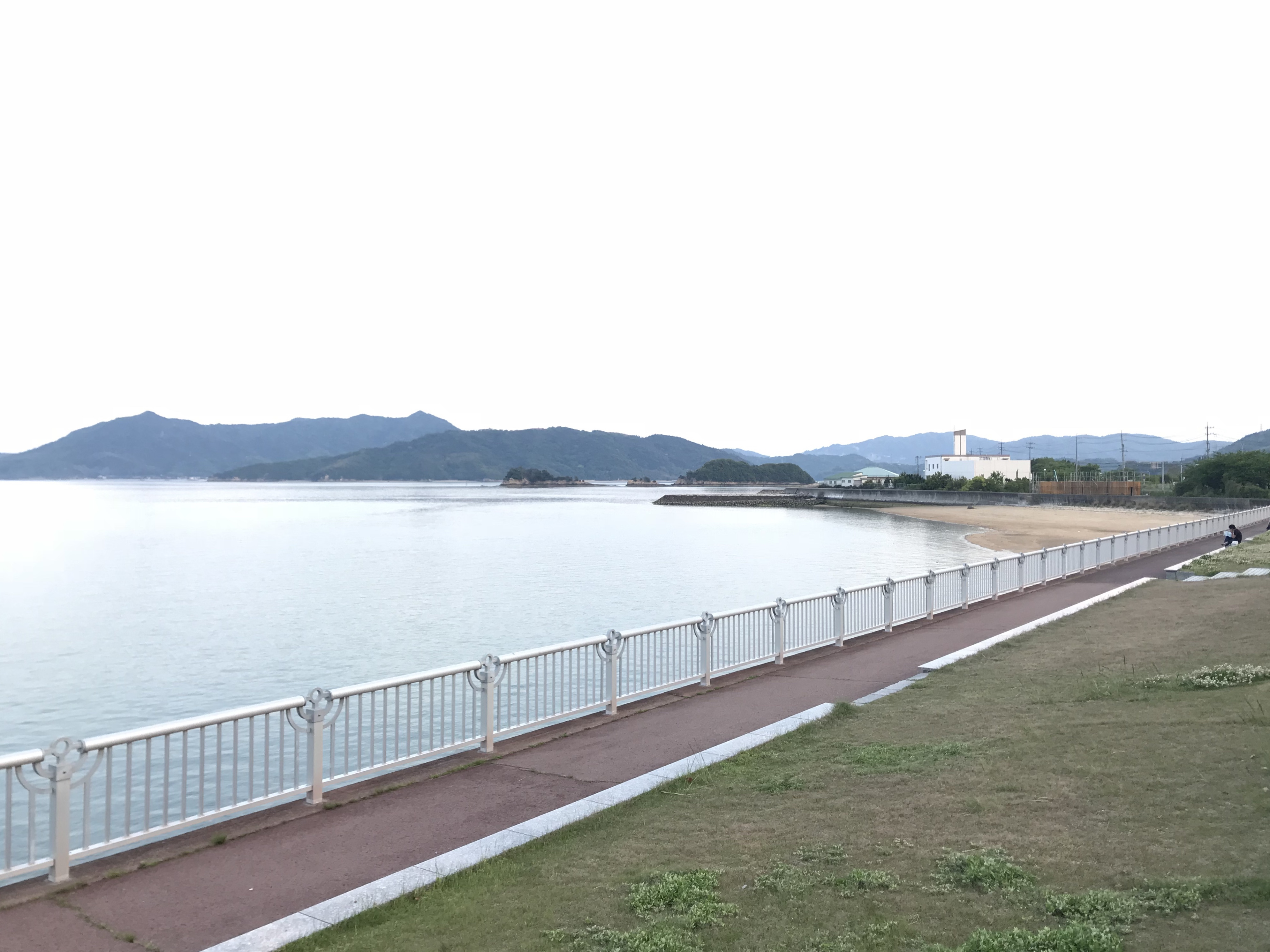 道の駅今治市多々羅しまなみ公園より望む伯方島